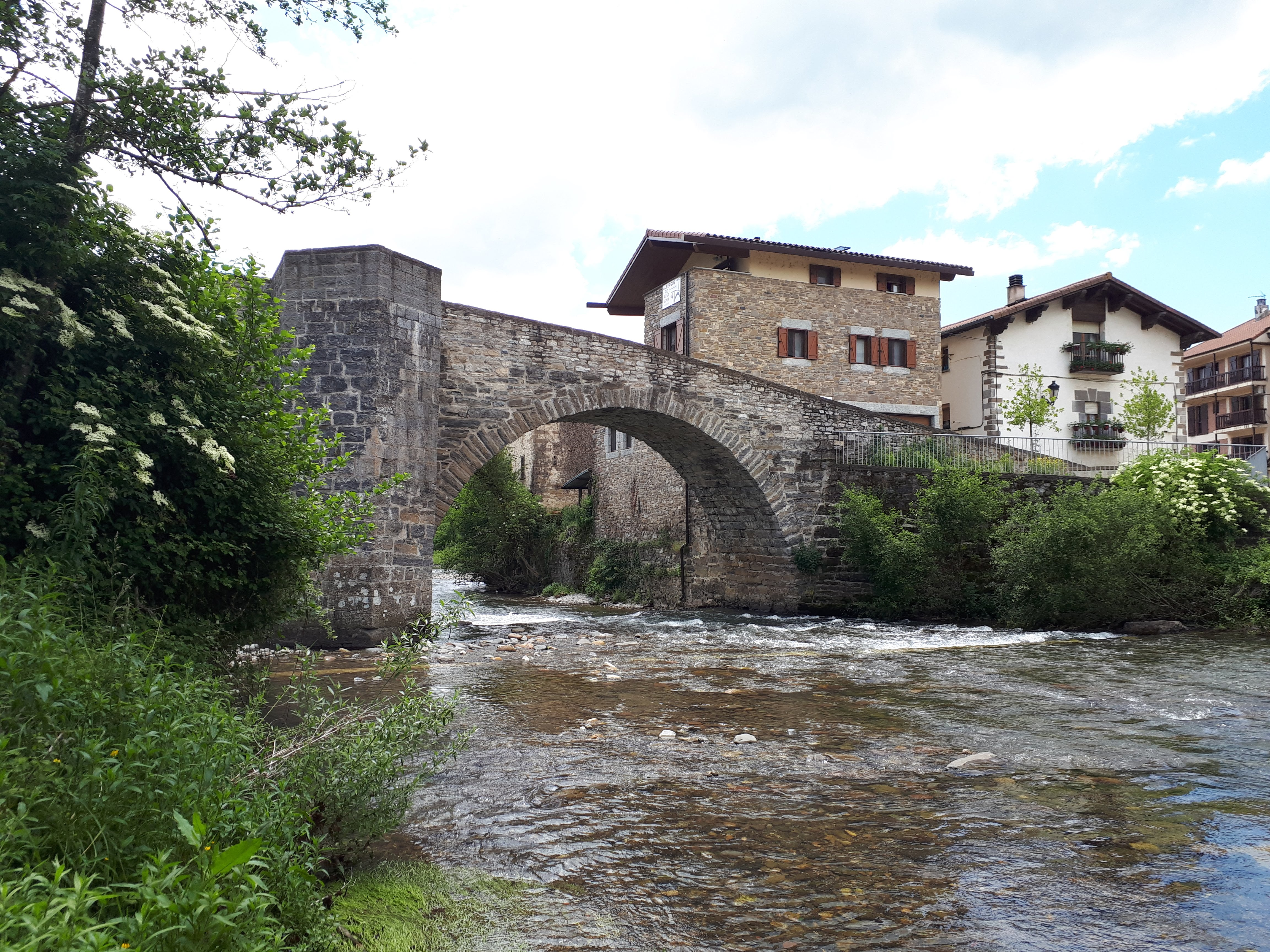 Puente gótico sobre el río Arga en la localidad de Zubiri.